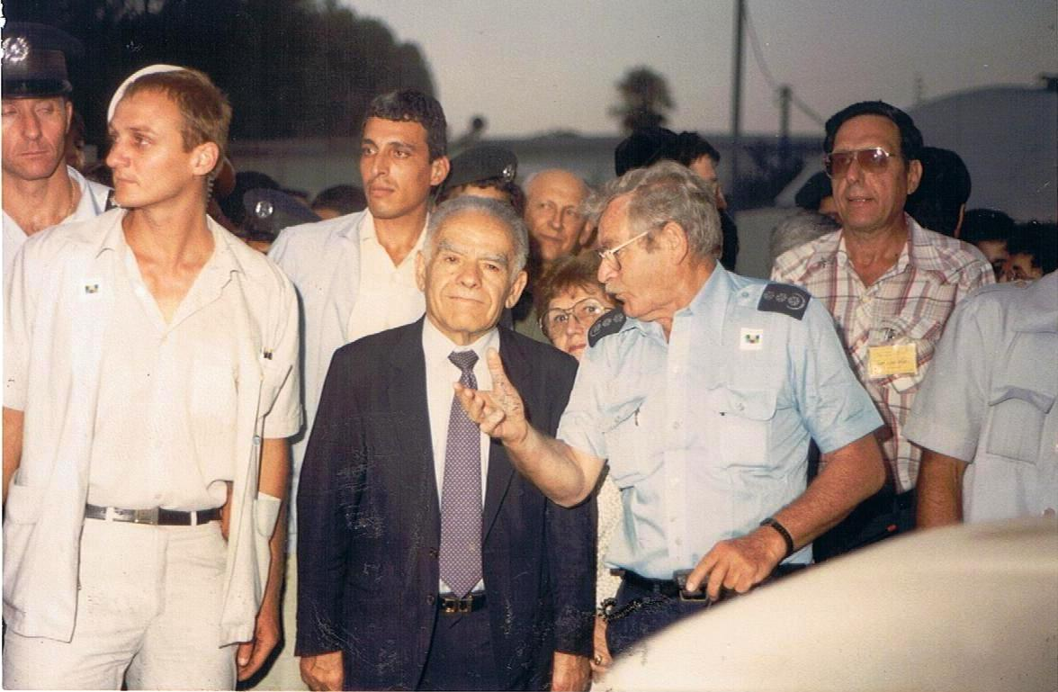 עם ראש הממשלה שמיר במלחמת המפרץ